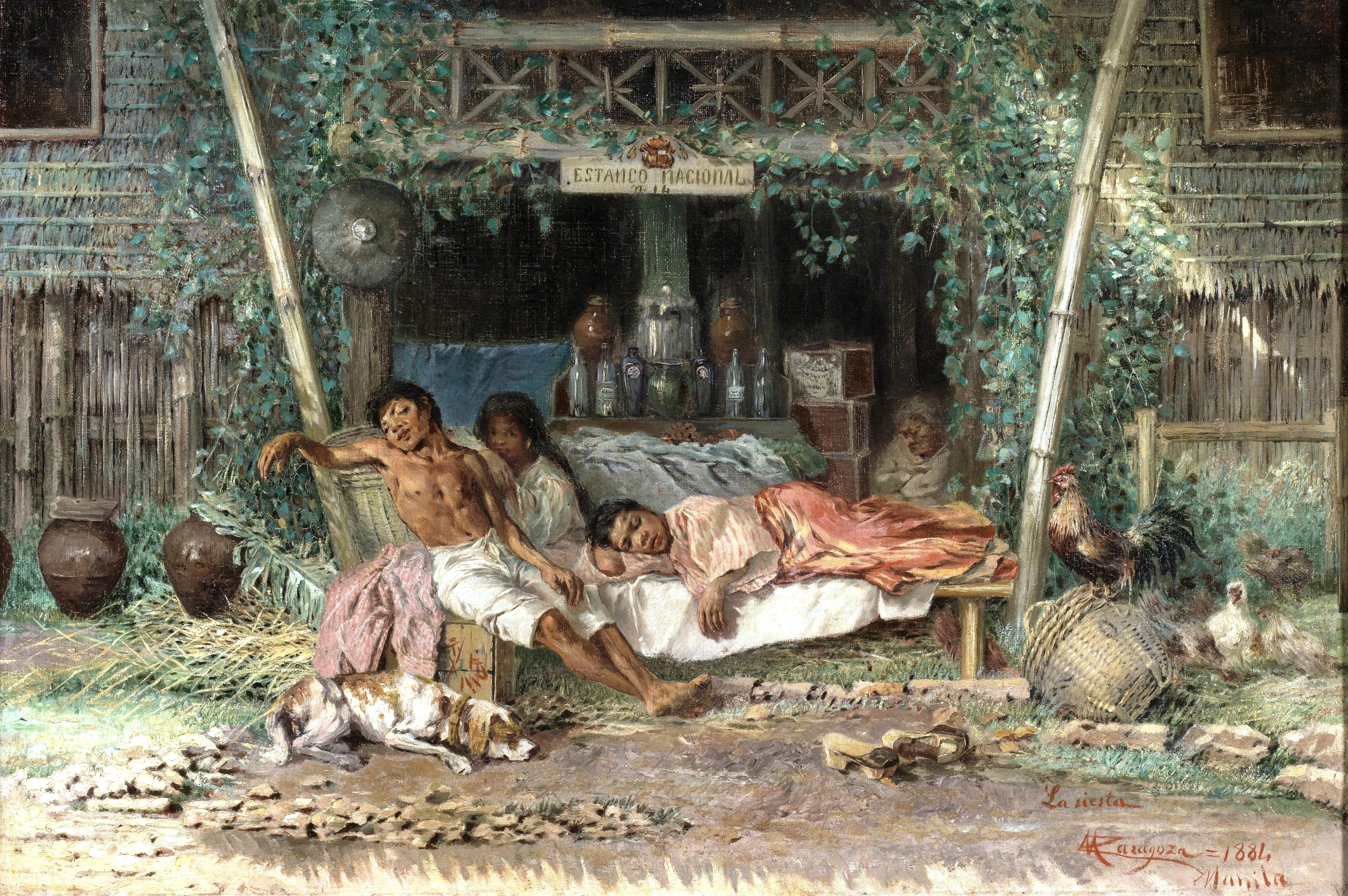 La obra representa a un grupo de niños durmiendo la siesta.